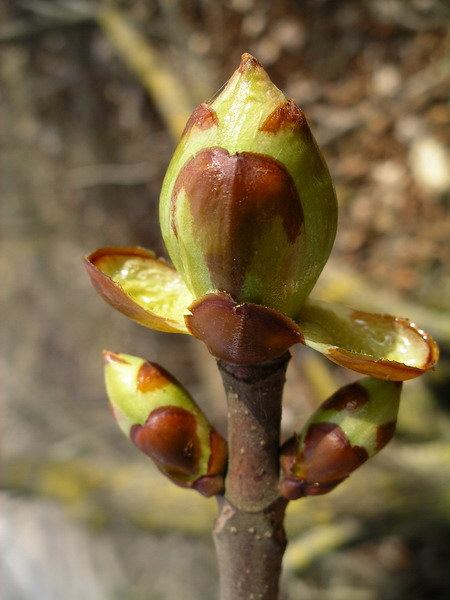 Kaštono pumpuras